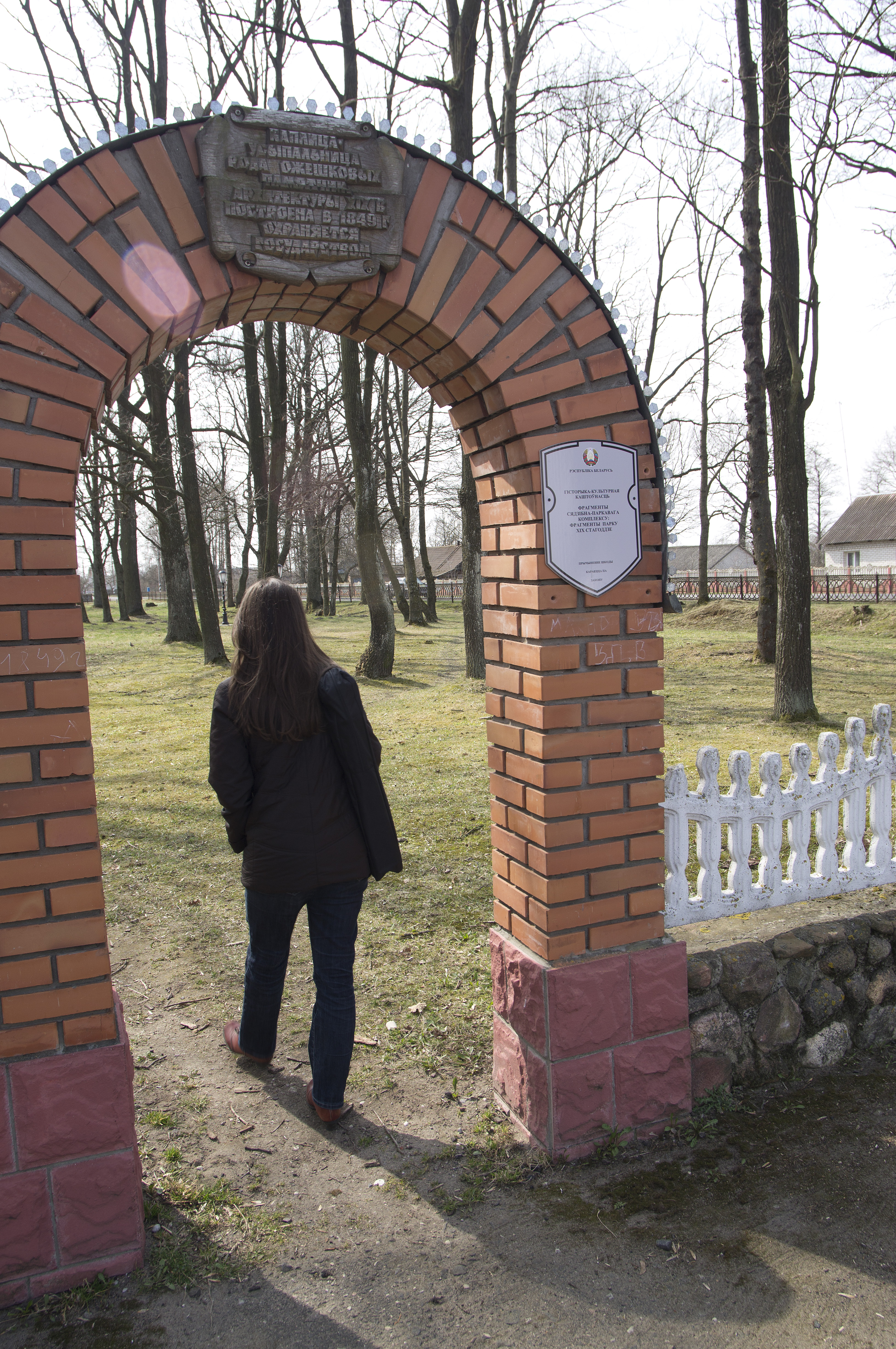 Беларуская (тарашкевіца): Фрагмэнты сядзібна-паркавага комплексу:капліца-пахавальнявінакурняфрагмэнты парку. в. Закозель This is a photo of Belarusian heritage monument. Reference number: 113Г000196 ( WLM)